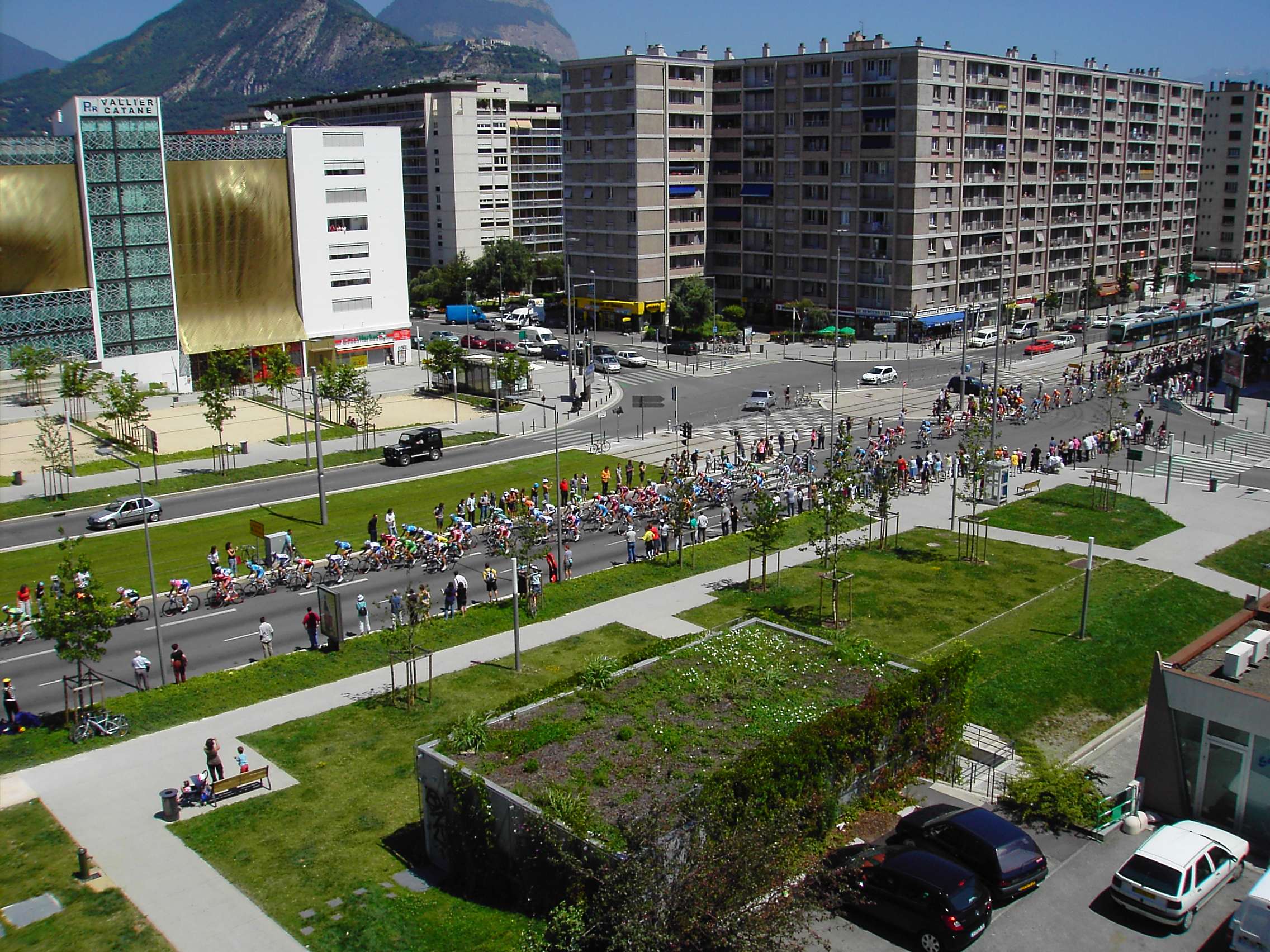 Passage Tour de France 2008 à Grenoble (18ème étape : Bourg d'Oisans - Saint Etienne)